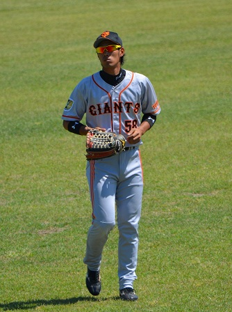 立岡宗一郎